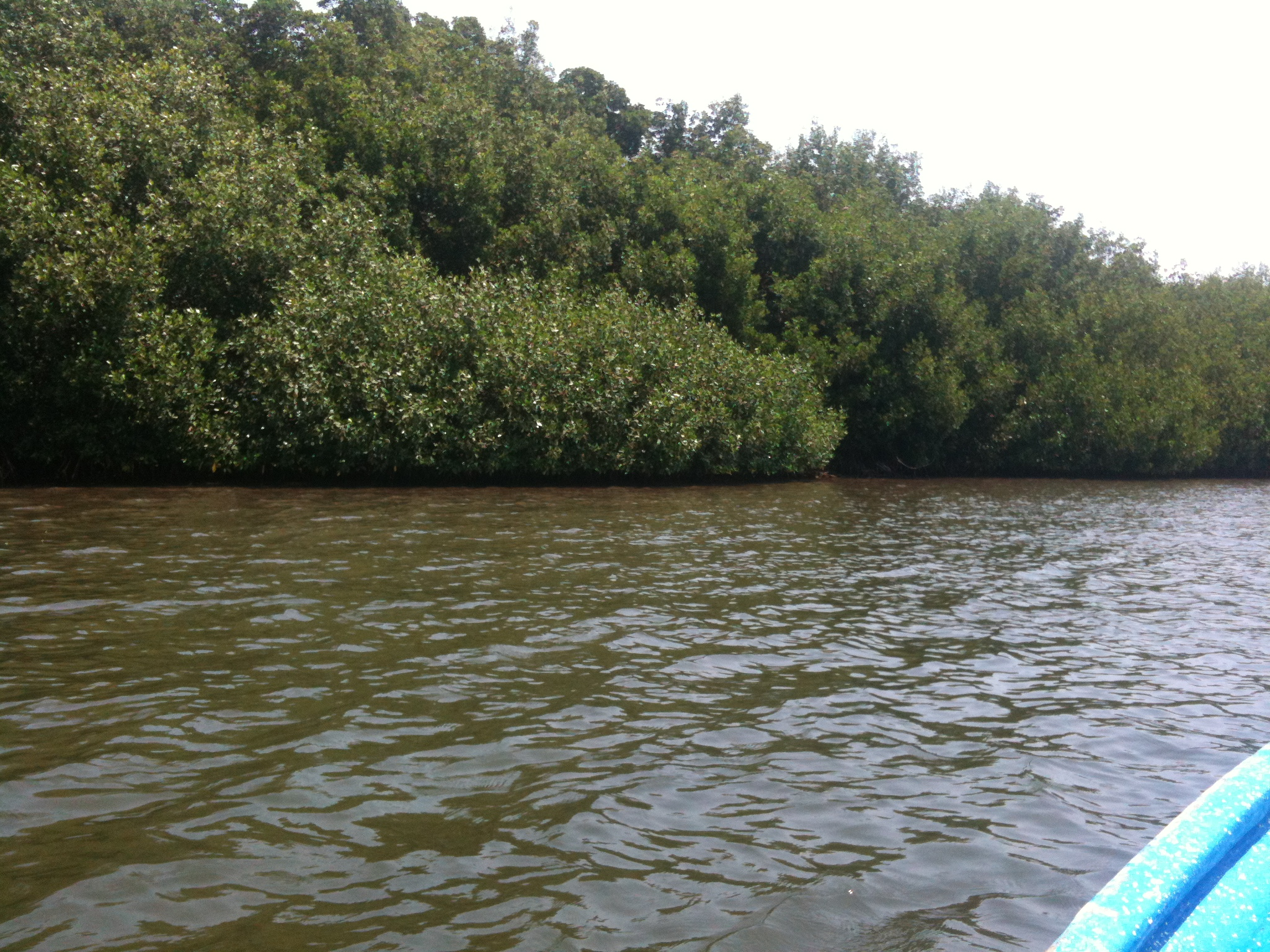 A lo largo de la laguna de Boca del Cielo se pueden encontrar estos manglares